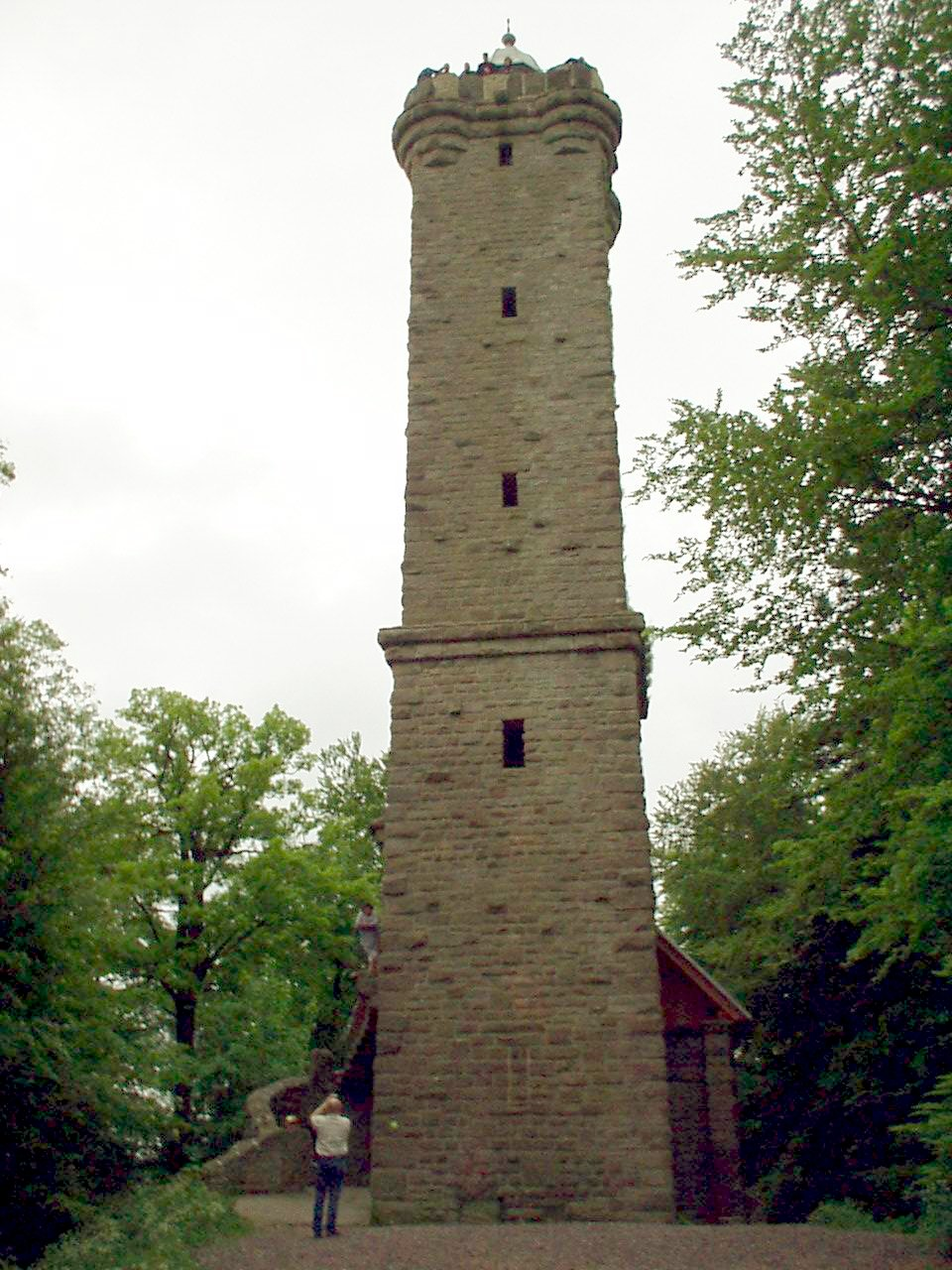 Luitpoldturm (Hermersbergerhof)